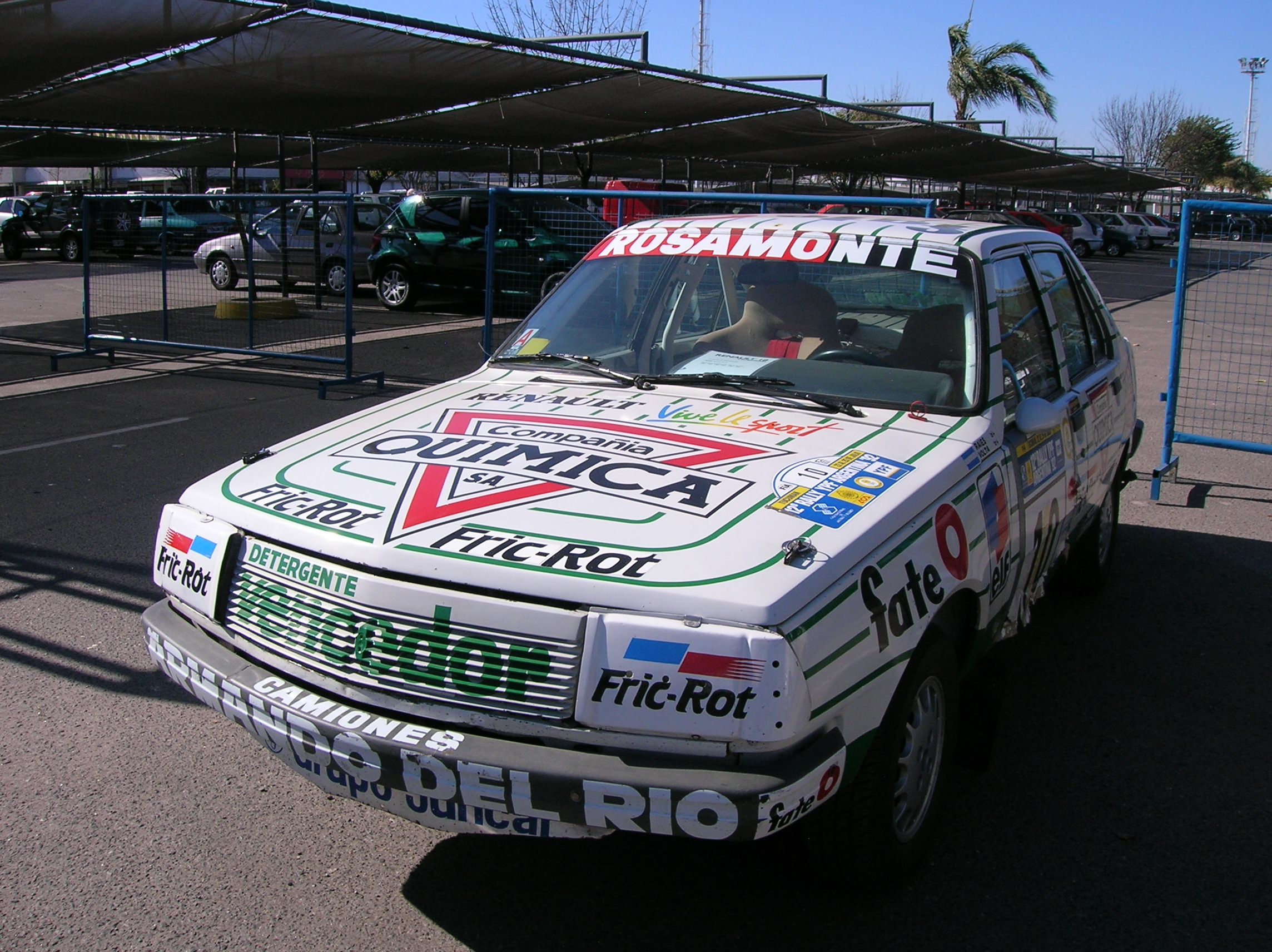 Vehículo actualmente de exposición. Corredor: Gabriel Raies y Mario Volta. Año 1992. Fecha puntable del WRC.